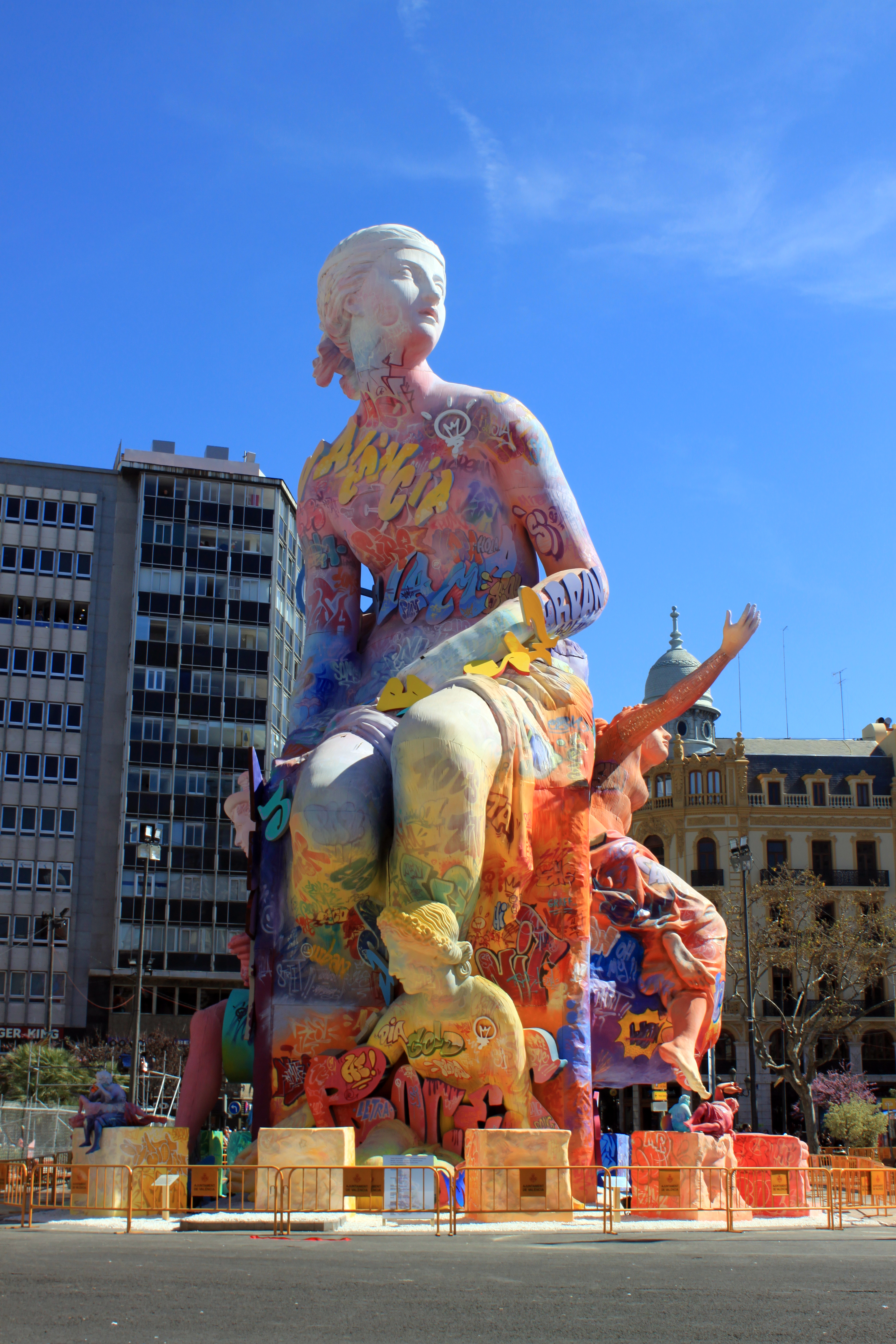 Falla del Ayuntamiento de Valencia de 2019. Valencia, Comunidad Valenciana, España.